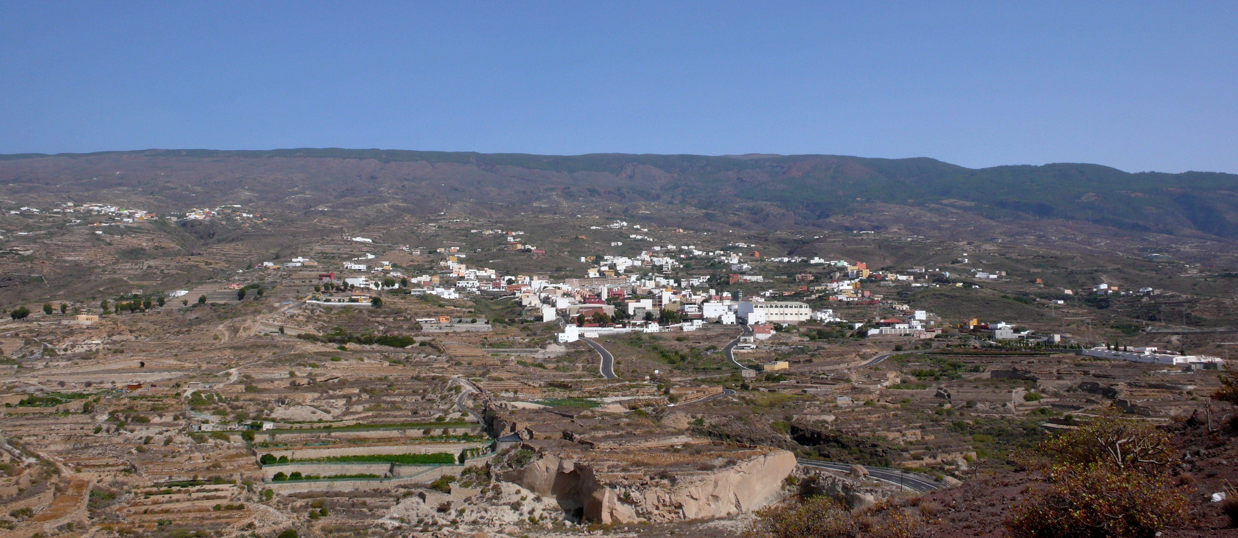 Vista panorámica de Fasnia, Tenerife, desde la montaña de Fasnia. A la izquierda, el barrio de La Sombrera